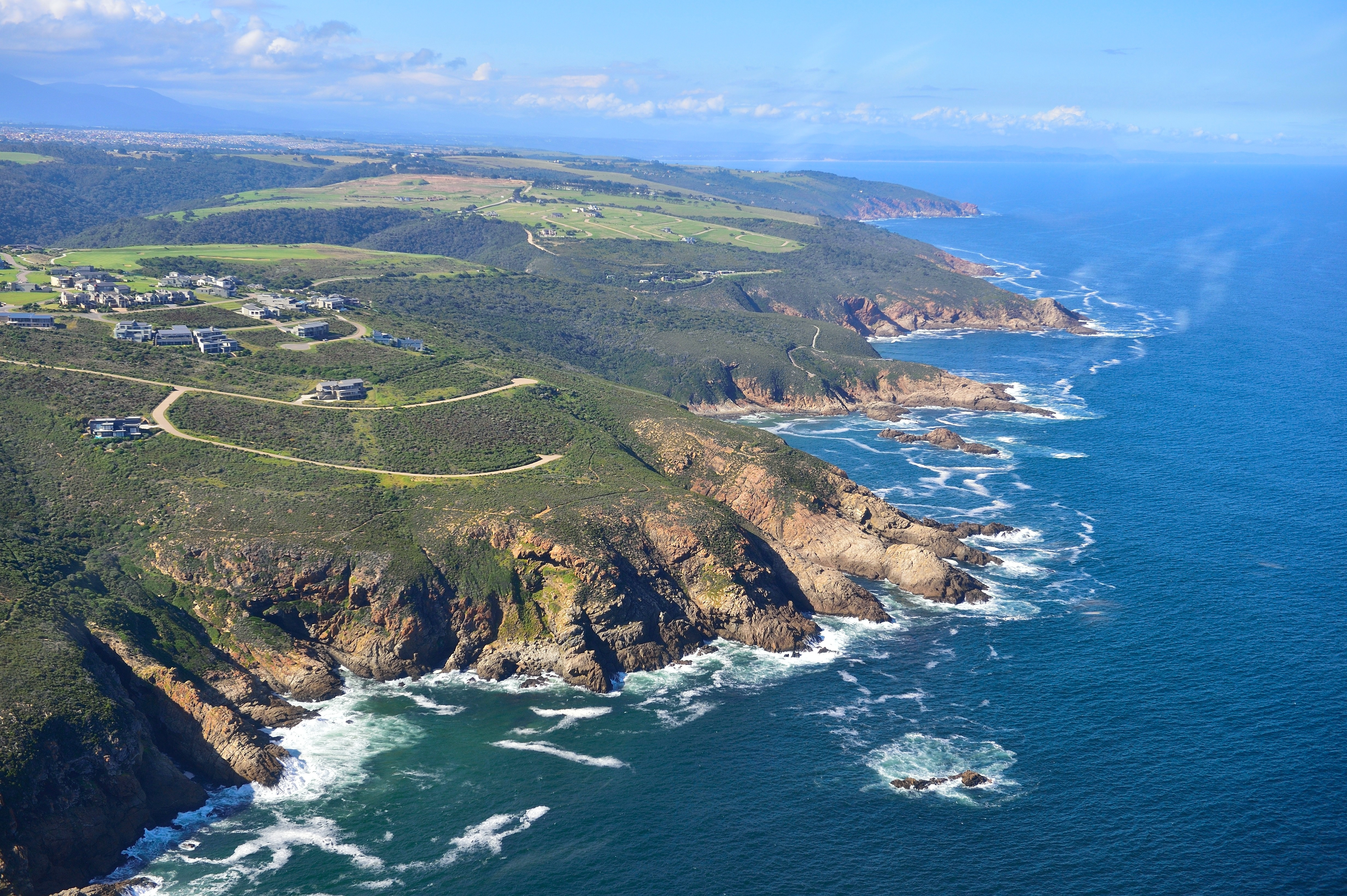 Vue de l'Eastern Cape en Afrique du Sud.